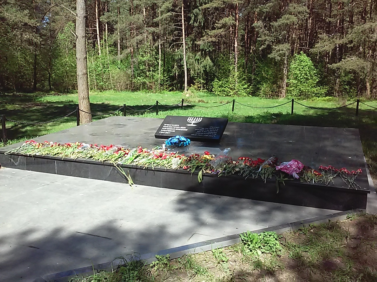 Братская могила (известная как "Детская могила") на одном из мест массовых убийств нацистами и их пособниками евреев Лиды 8 мая 1942 года. Находится в 100 метрах от кольцевой дороги Лиды на продолжении улицы Красноармейская справа от неё в лесу. (После реконструкции в 2017 году)